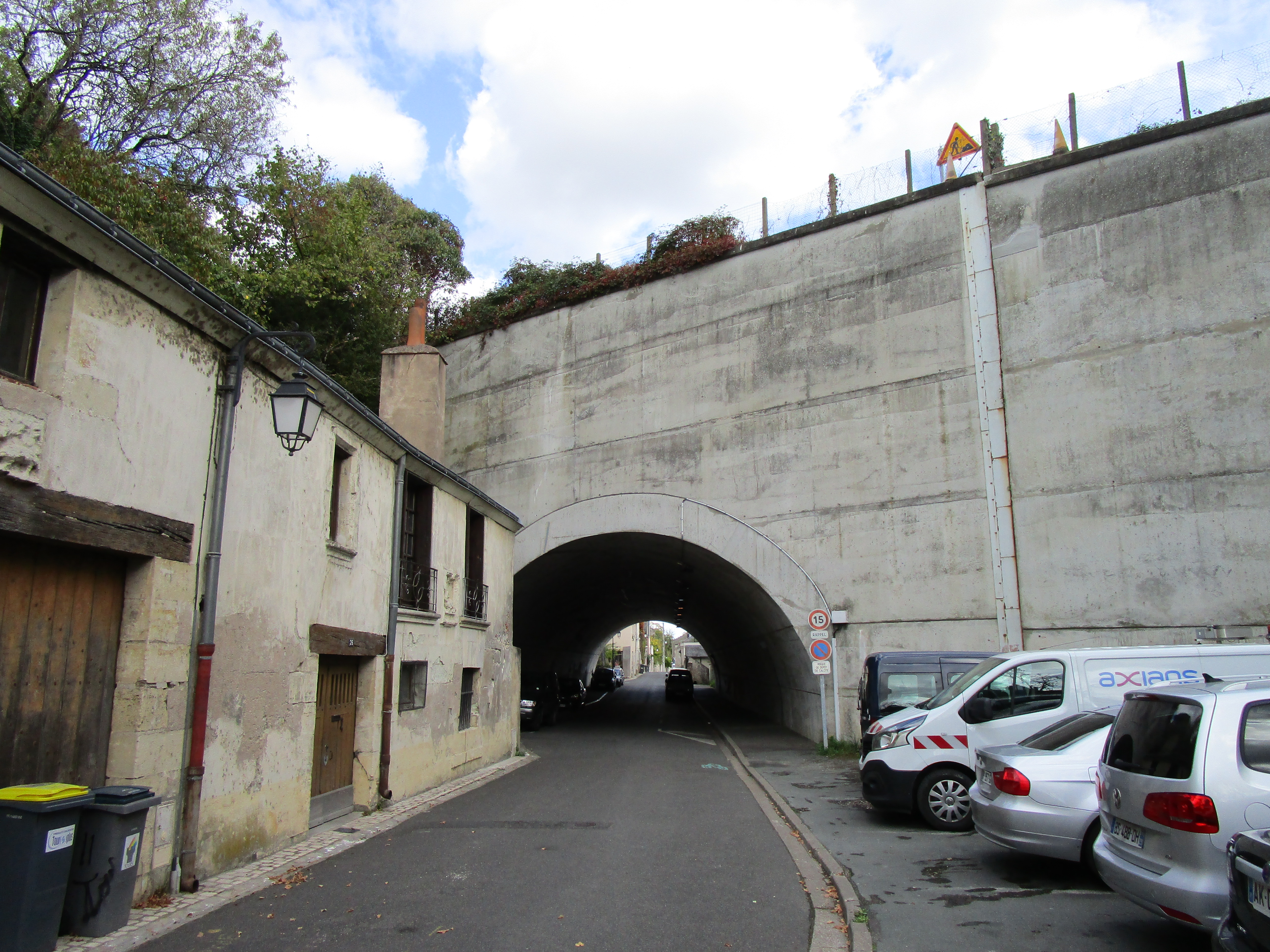 La rue Saint-Gatien et le tunnel passant sous l'autoroute A10, dans le quartier Sainte-Radegonde à Tours.